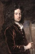 James Berkeley (1680-1736)